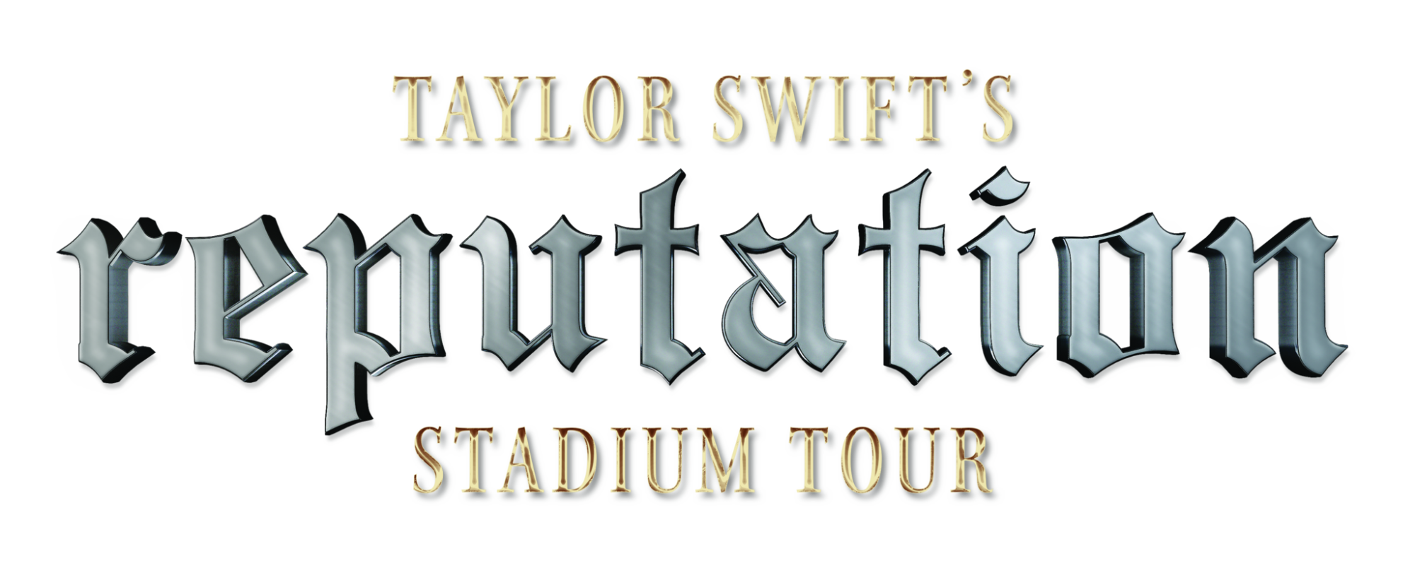 Fuente usada en los carteles promocionales del Reputation Stadium Tour (2018) de Taylor Swift